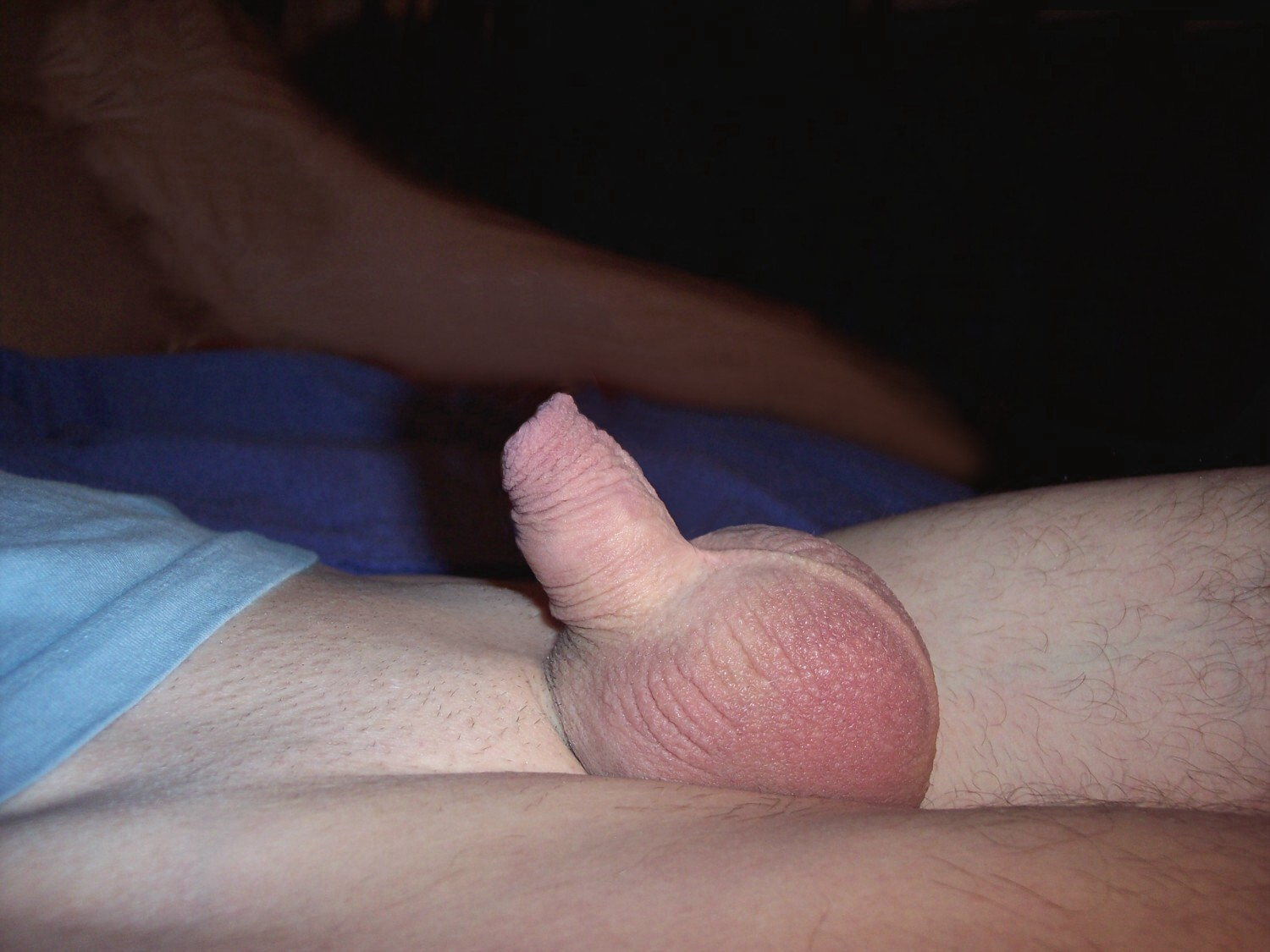 micropénis